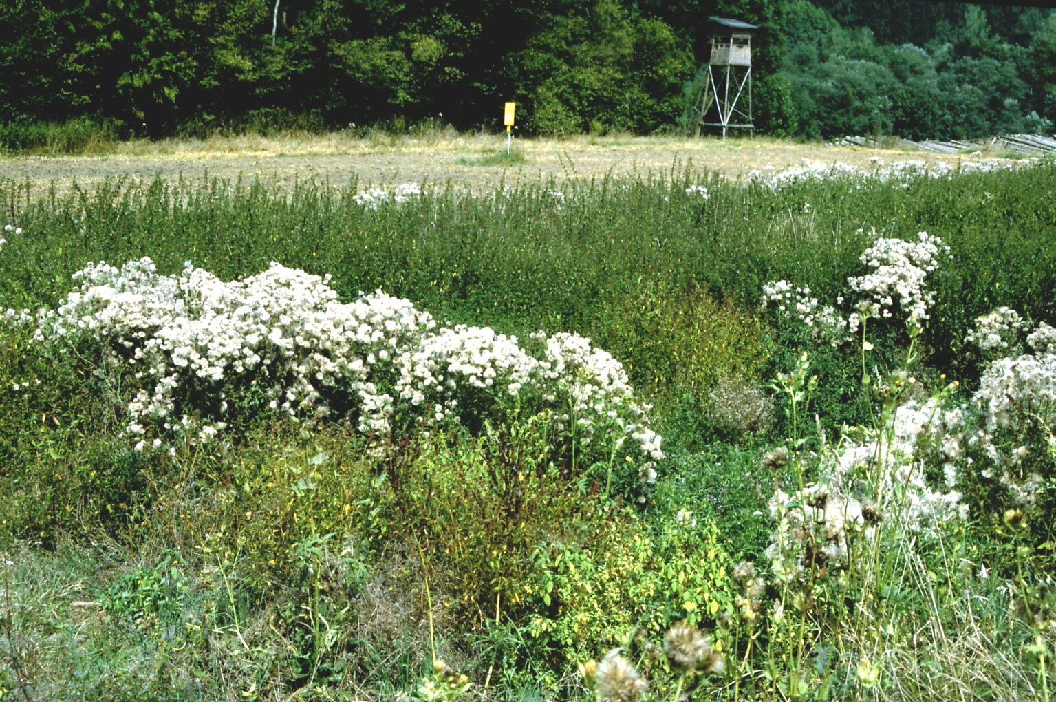 Wiesenbrache